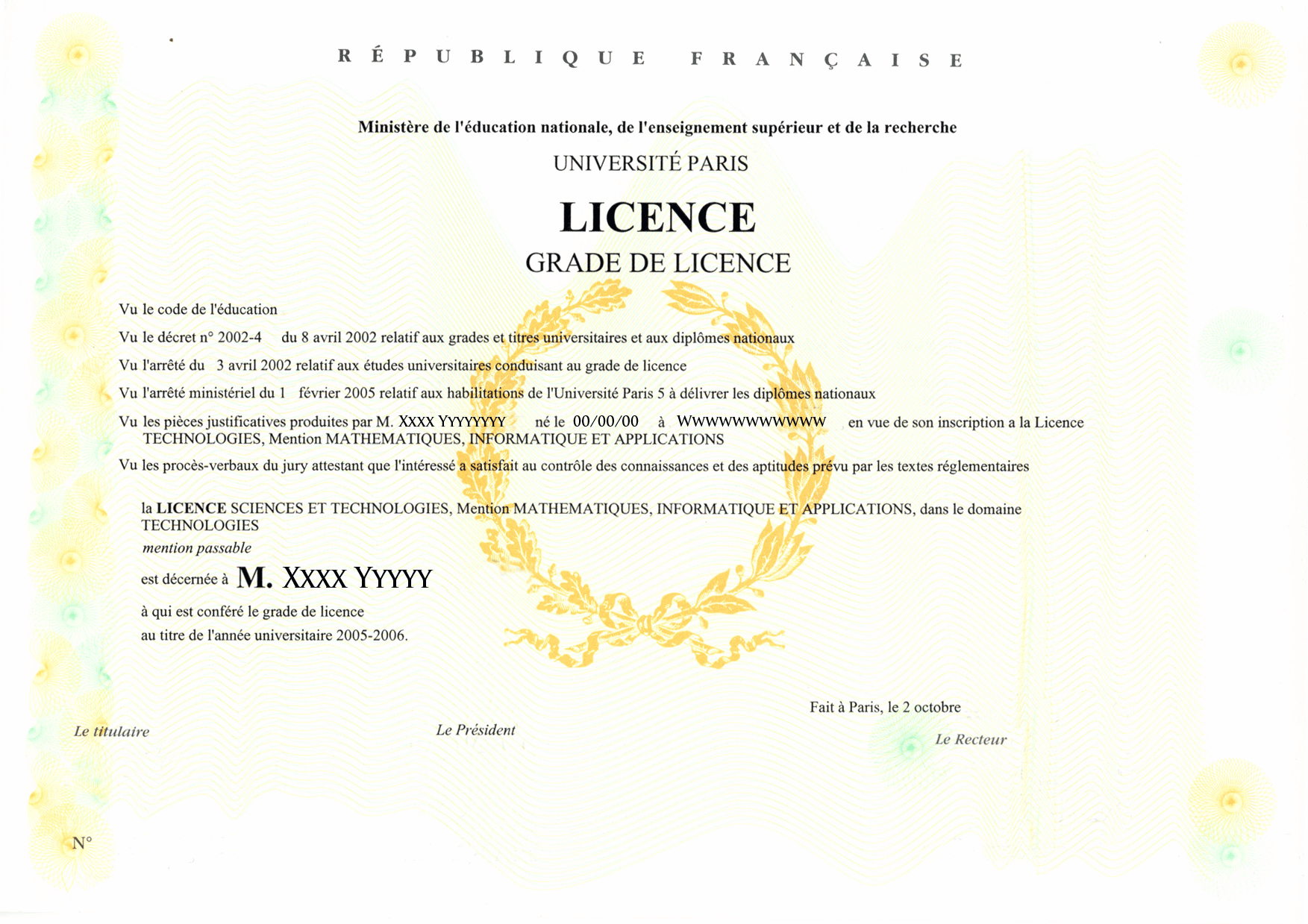 fac-similé d'un diplôme anonyme de licence française